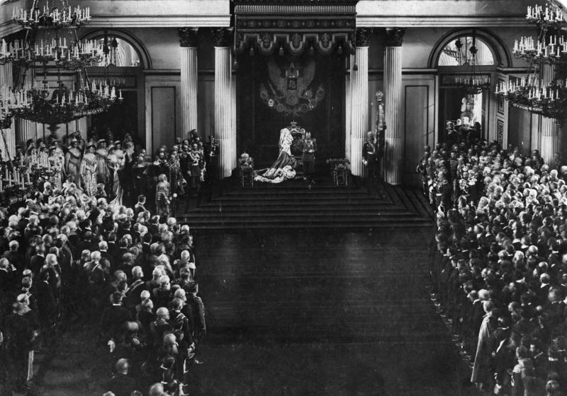 St. Petersburg, Eröffnung der Parlamente Scherl Bilderdienst Russland, St. Petersburg.- Eröffnungsfeier der russischen Parlamente, Zar Nikolaus II. verliest die Thronrede. 3662-06 Zentralbild St. Petersburg 1906 Die Eröffnung der russischen Parlamente. UBz.: Der Zar verliest die Thronrede im Georgsaal des Winterpalais. Abgebildete Personen: Nikolaus II.: Rußland, Zar, II., Russland